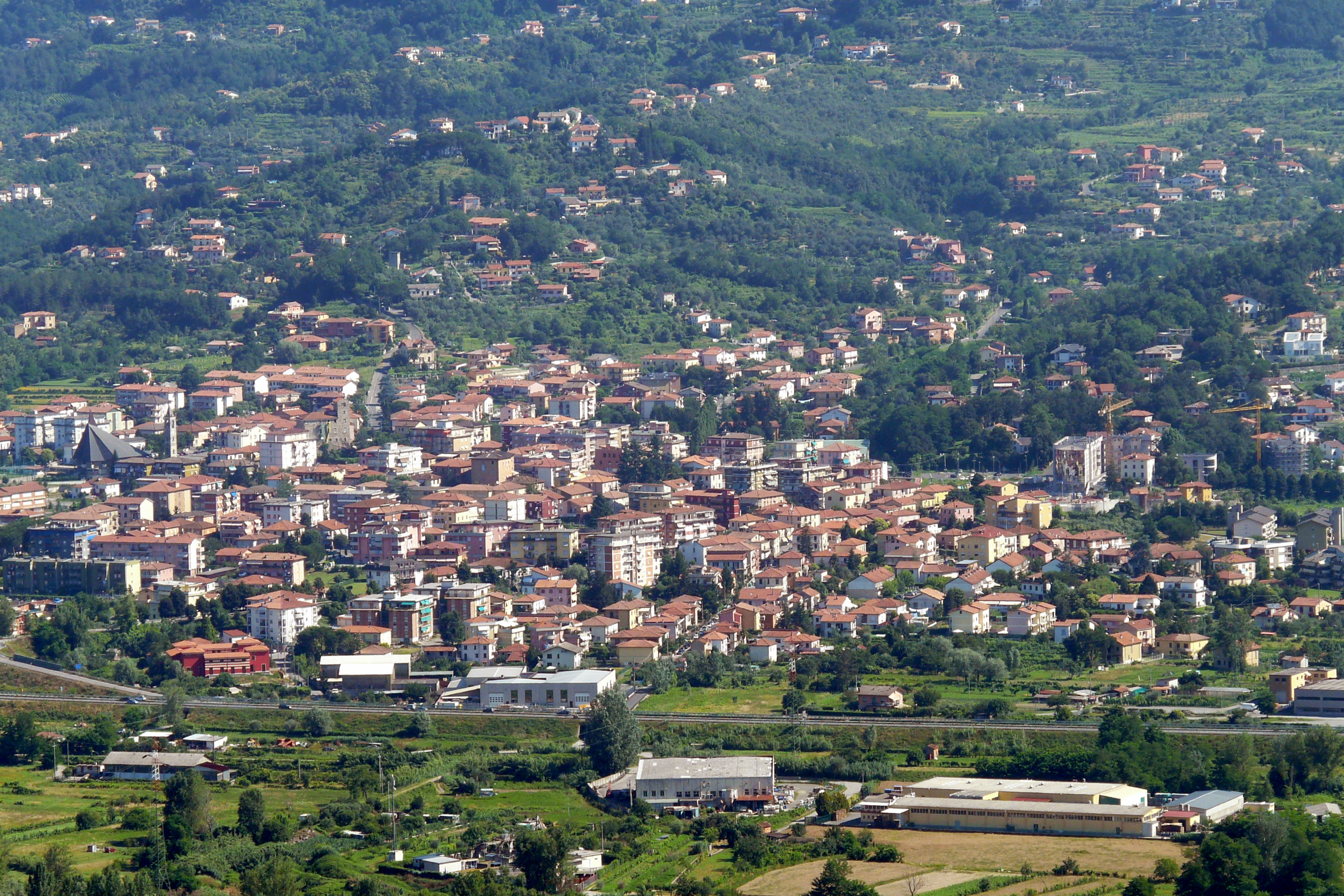 Piana di Ceparana, Bolano, Liguria, Italia